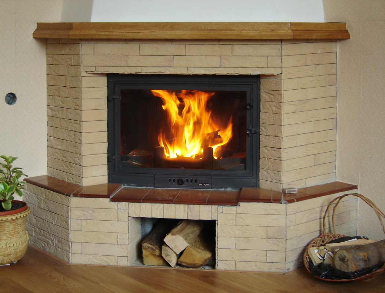 Kamin